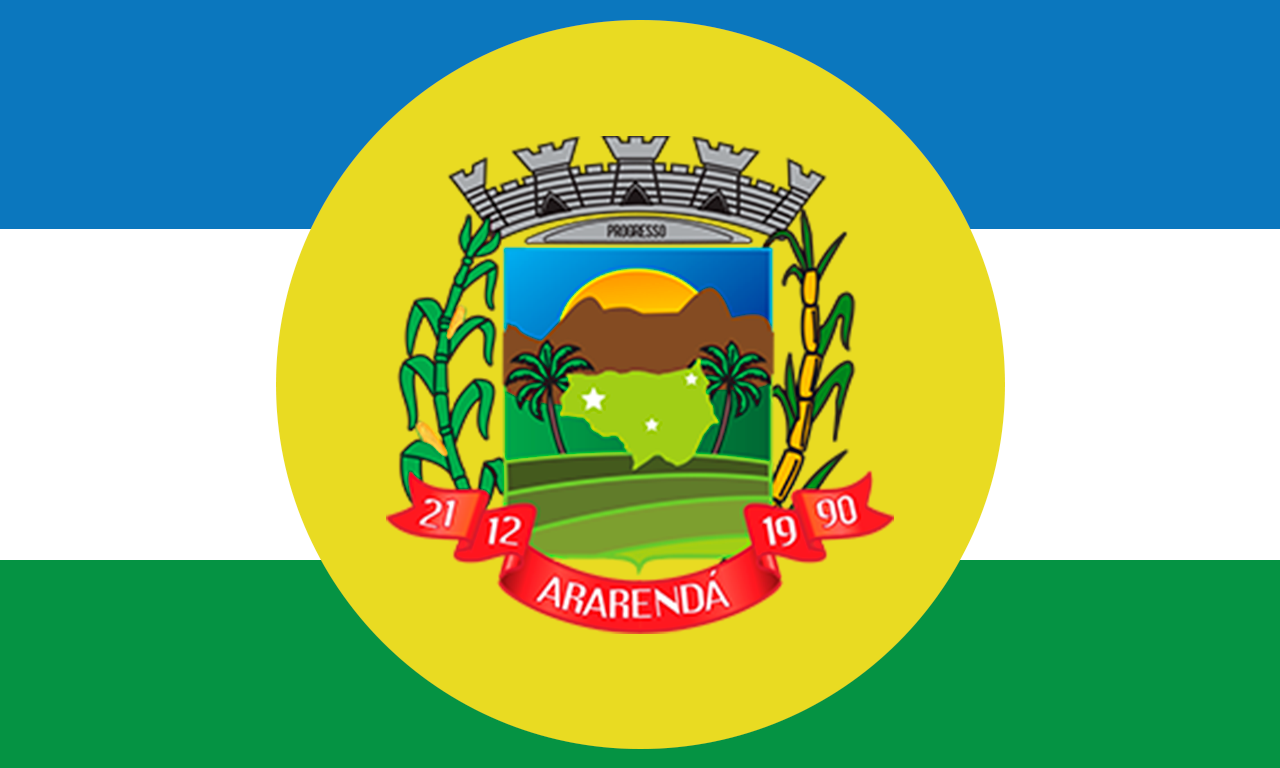 Bandeira da Prefeitura Municipal de Ararendá